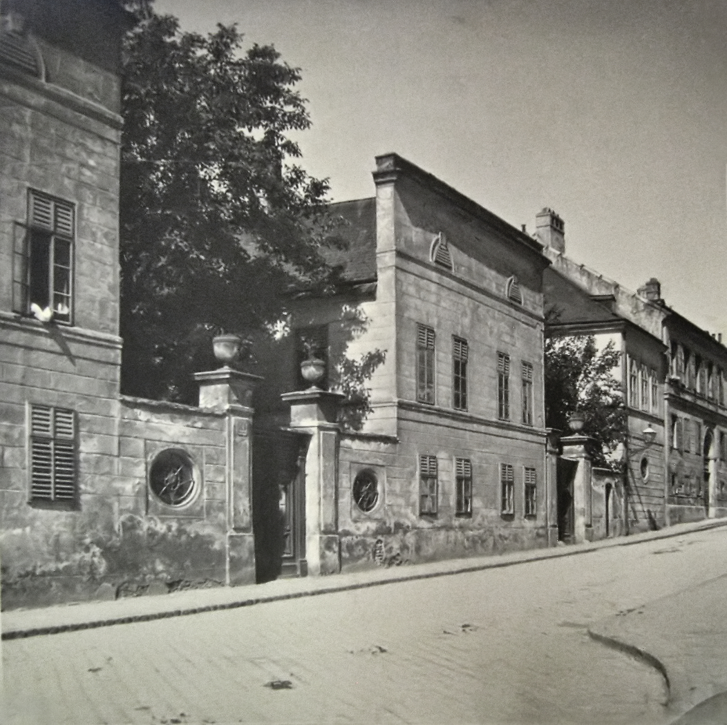 Gentz-Schlössel, Währingerstraße 169-171 (1918). Inv. PK 365